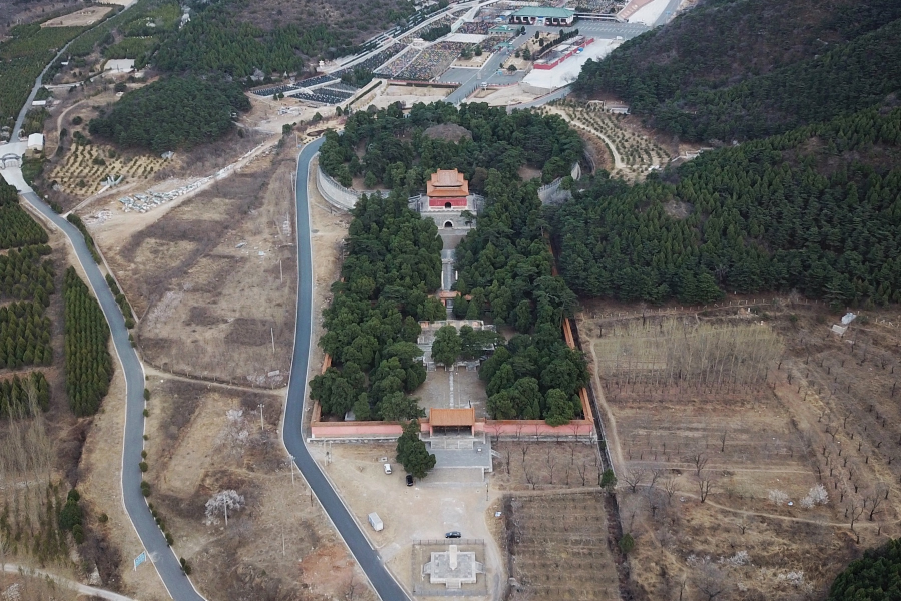 中文（中国大陆）: 明熹宗朱由校与皇后张氏的合葬墓--明德陵航拍图。